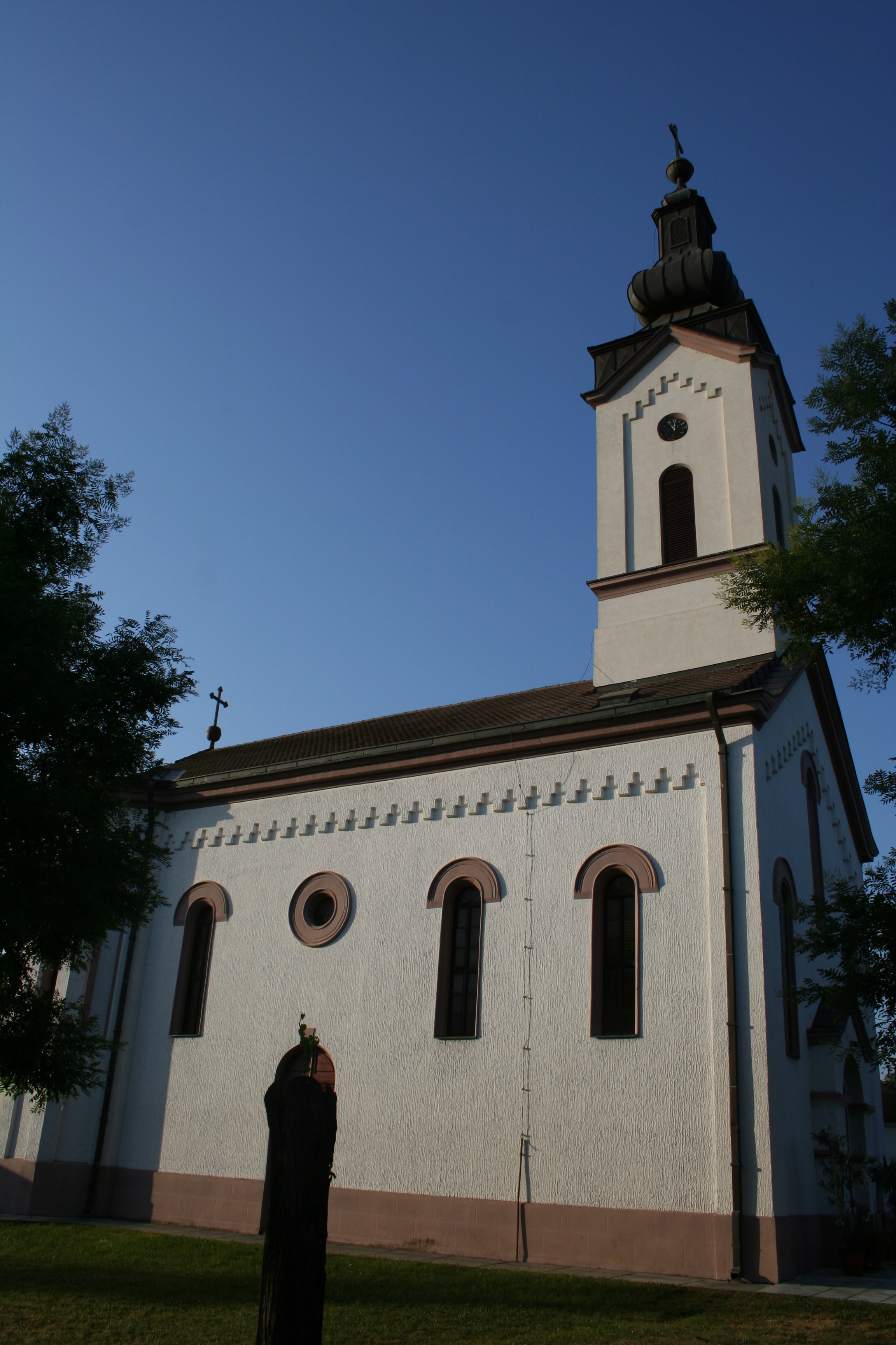 Crkva Sv. Konstantina i Jelene, Koceljeva